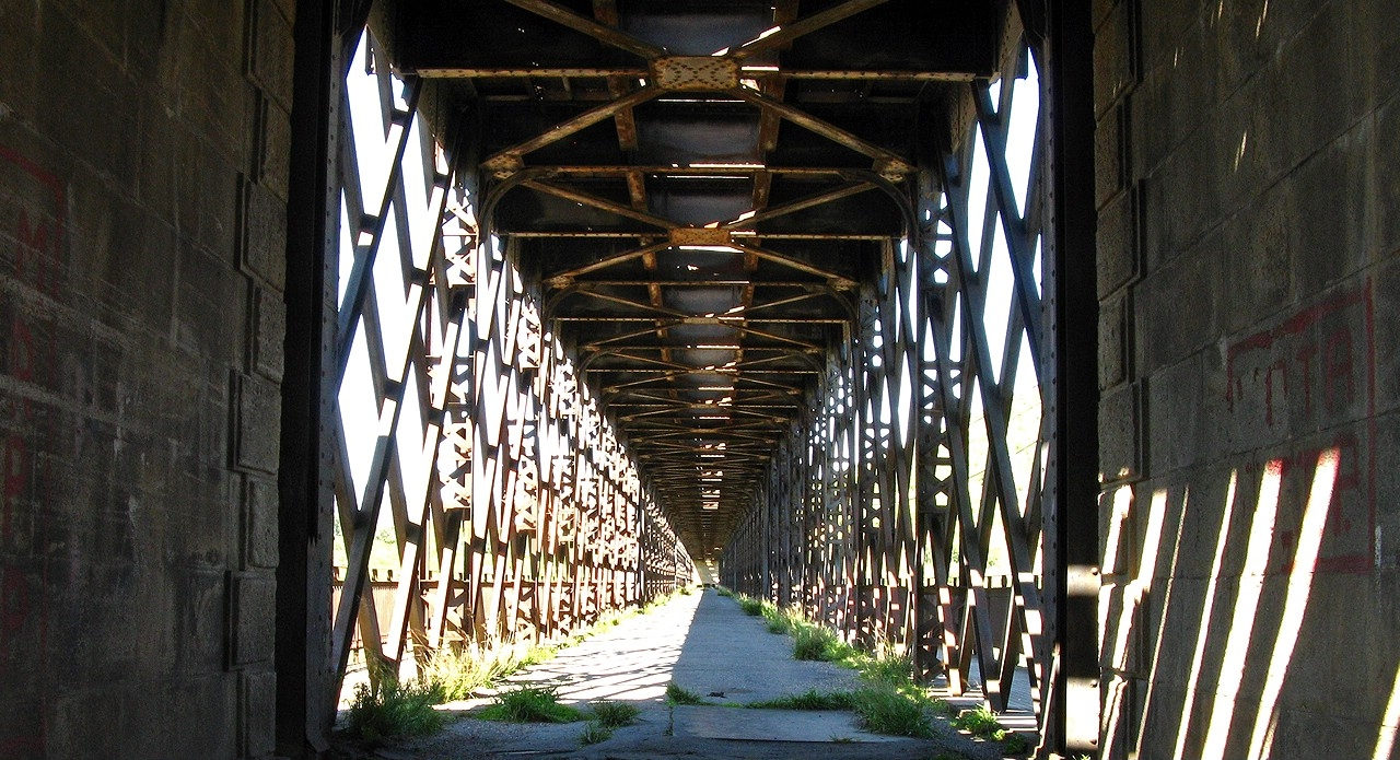 20 anos depois de passar o último carro, o tabuleiro rodoviário apresenta muitas irregularidades no piso e alguma vegetação que nasceu na ponte...